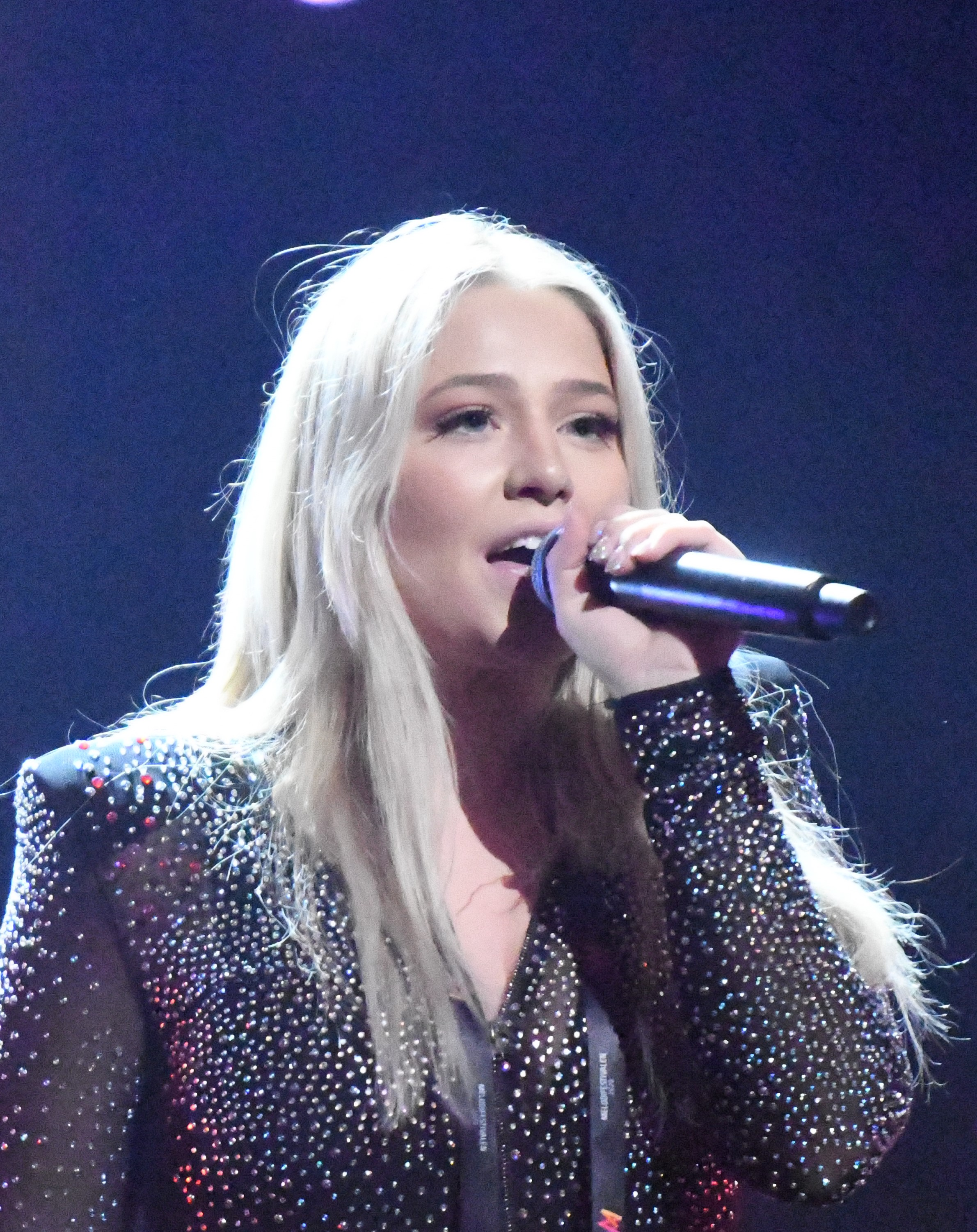 Melodifestivalen 2020, Göteborg, Klara Hammarström